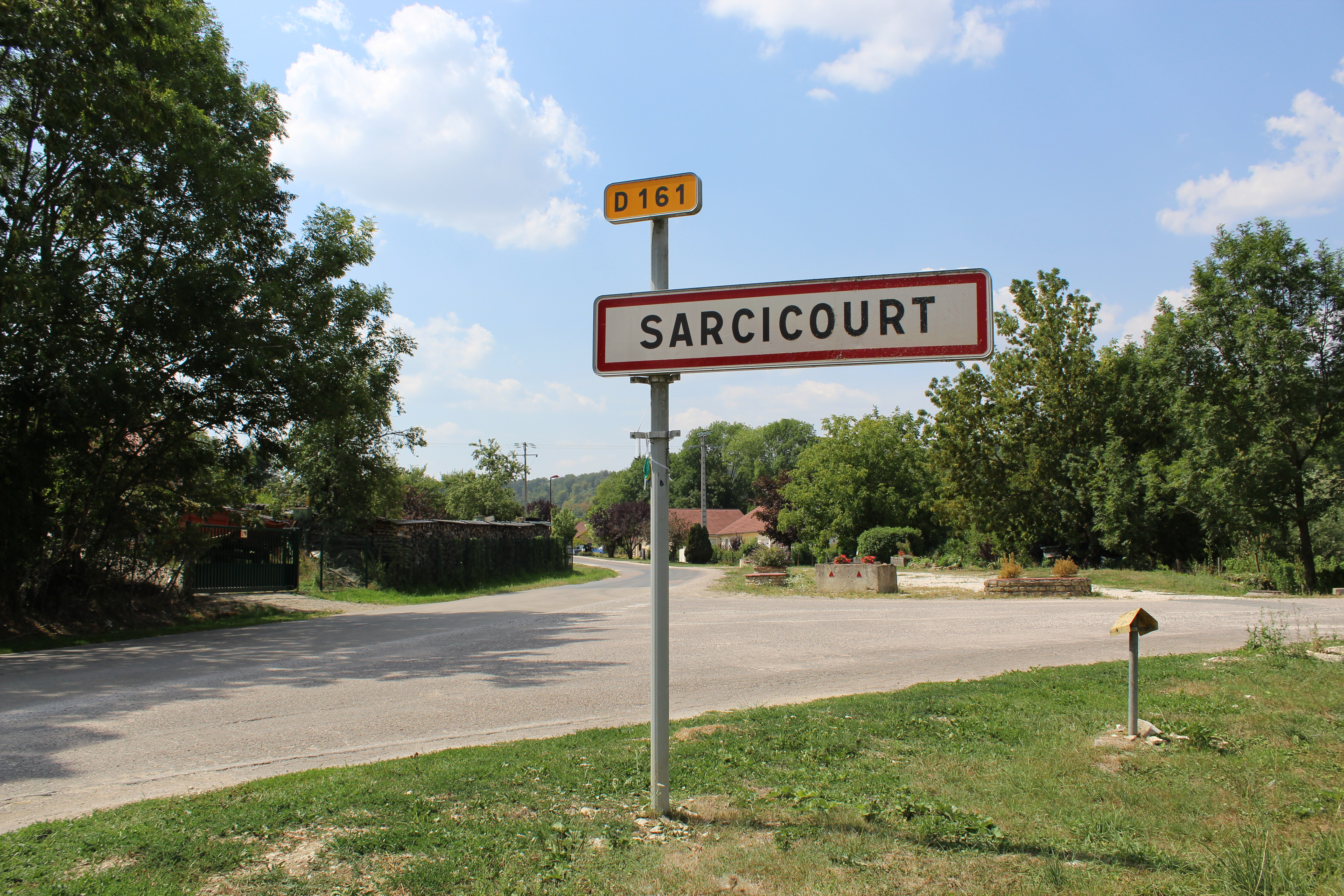 Entrée du vilage